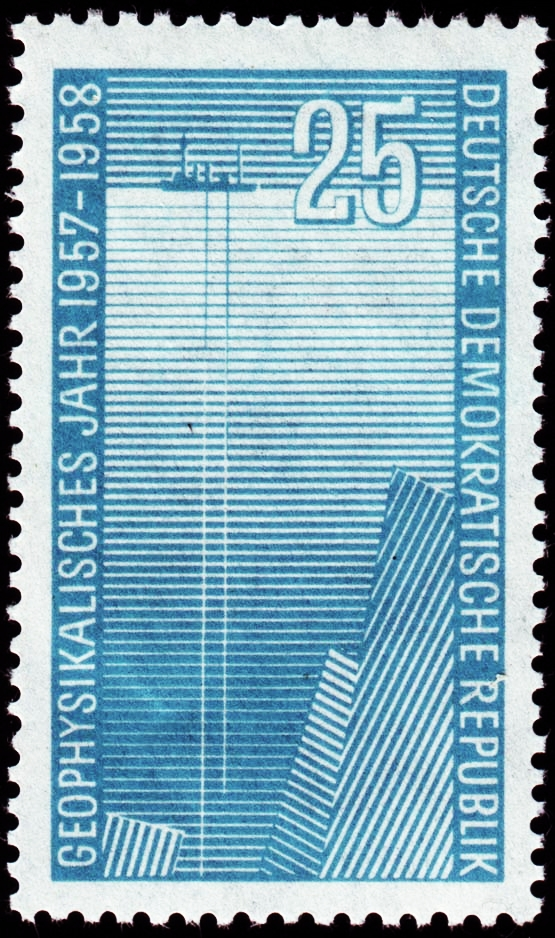 Année géophysique internationale, sondeur acoustique